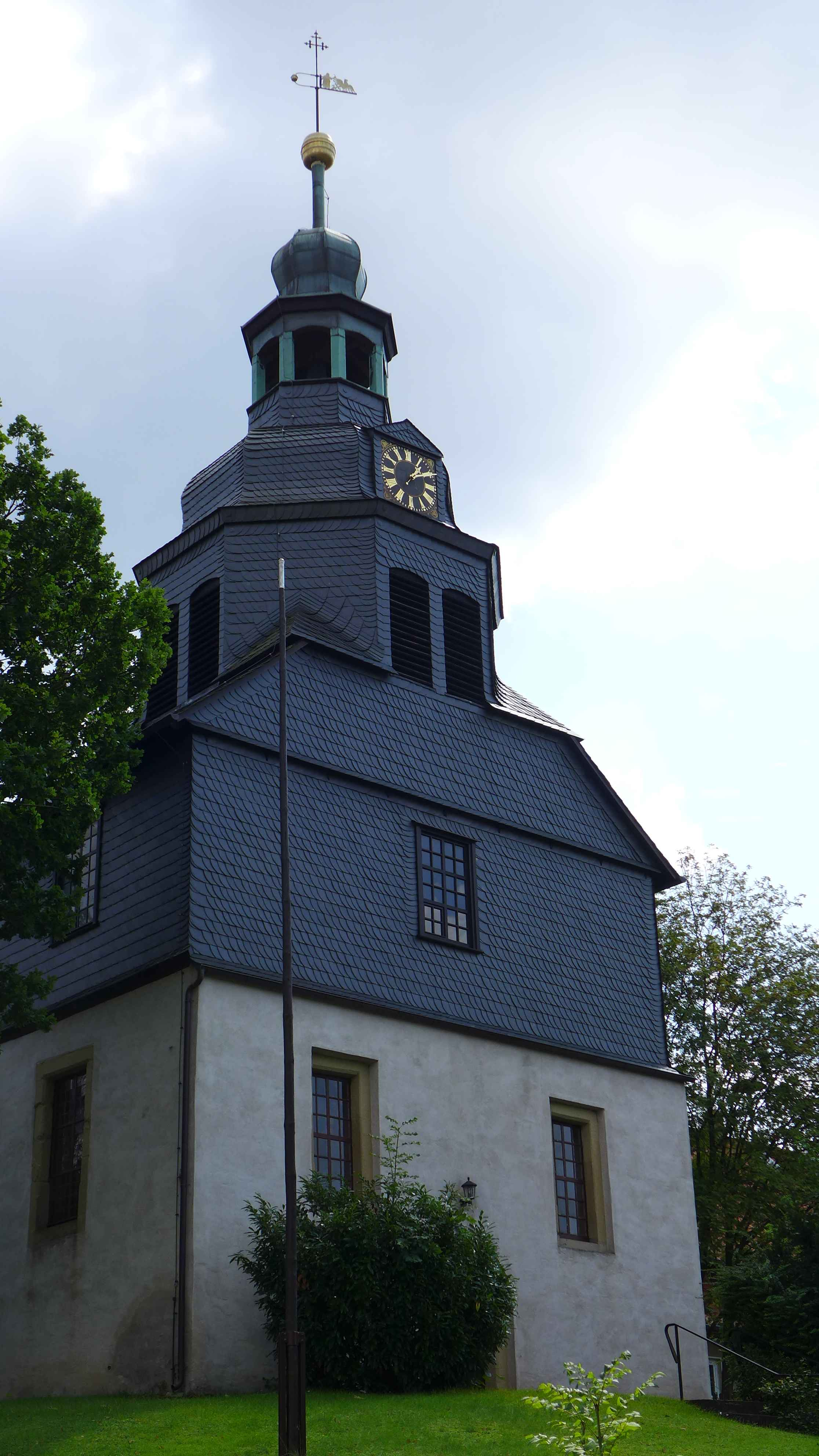 Kirche